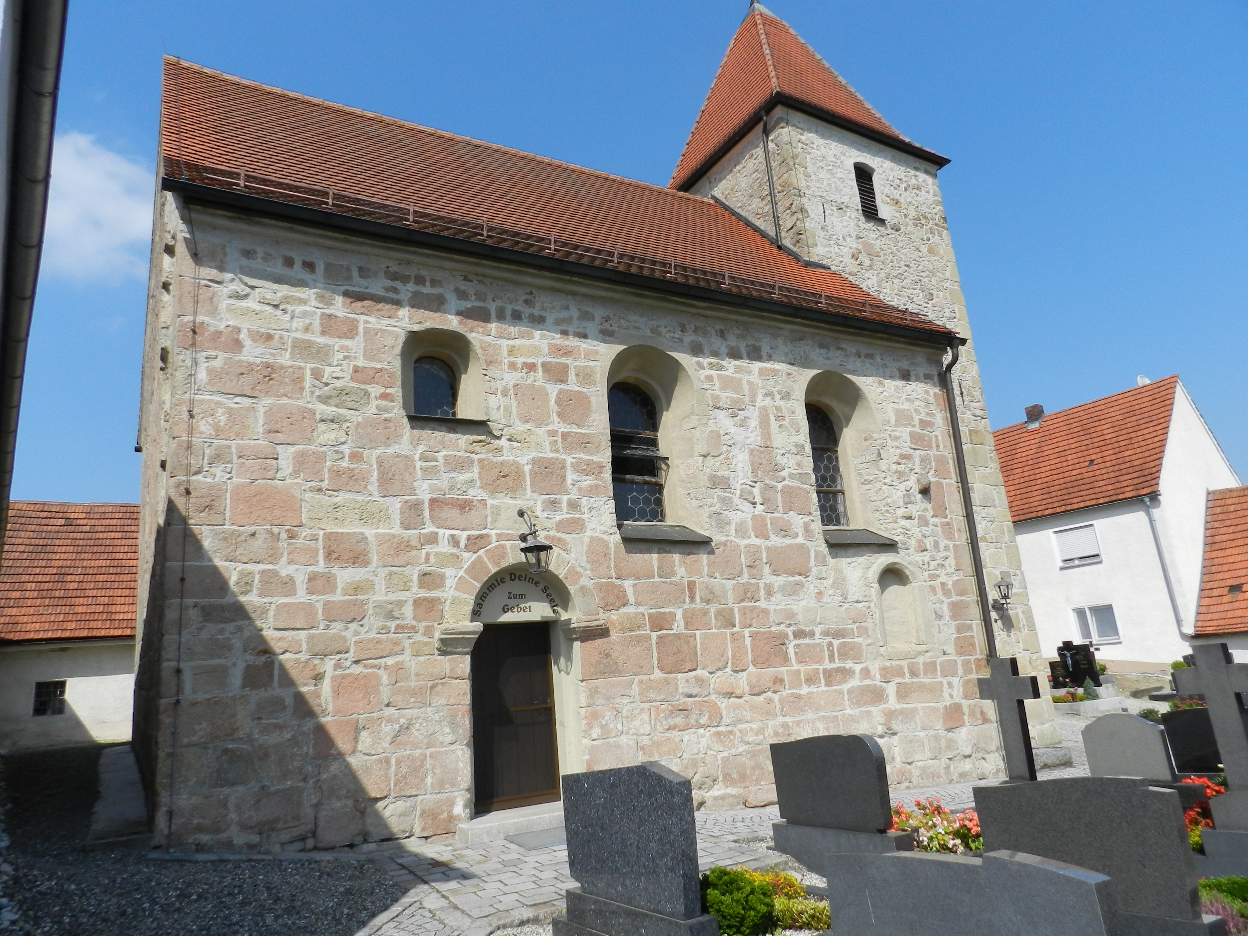 Willhof, Kirche St. Jakob; Gemeinde Altendorf, Landkreis Schwandorf, Oberpfalz, Bayern (2011)